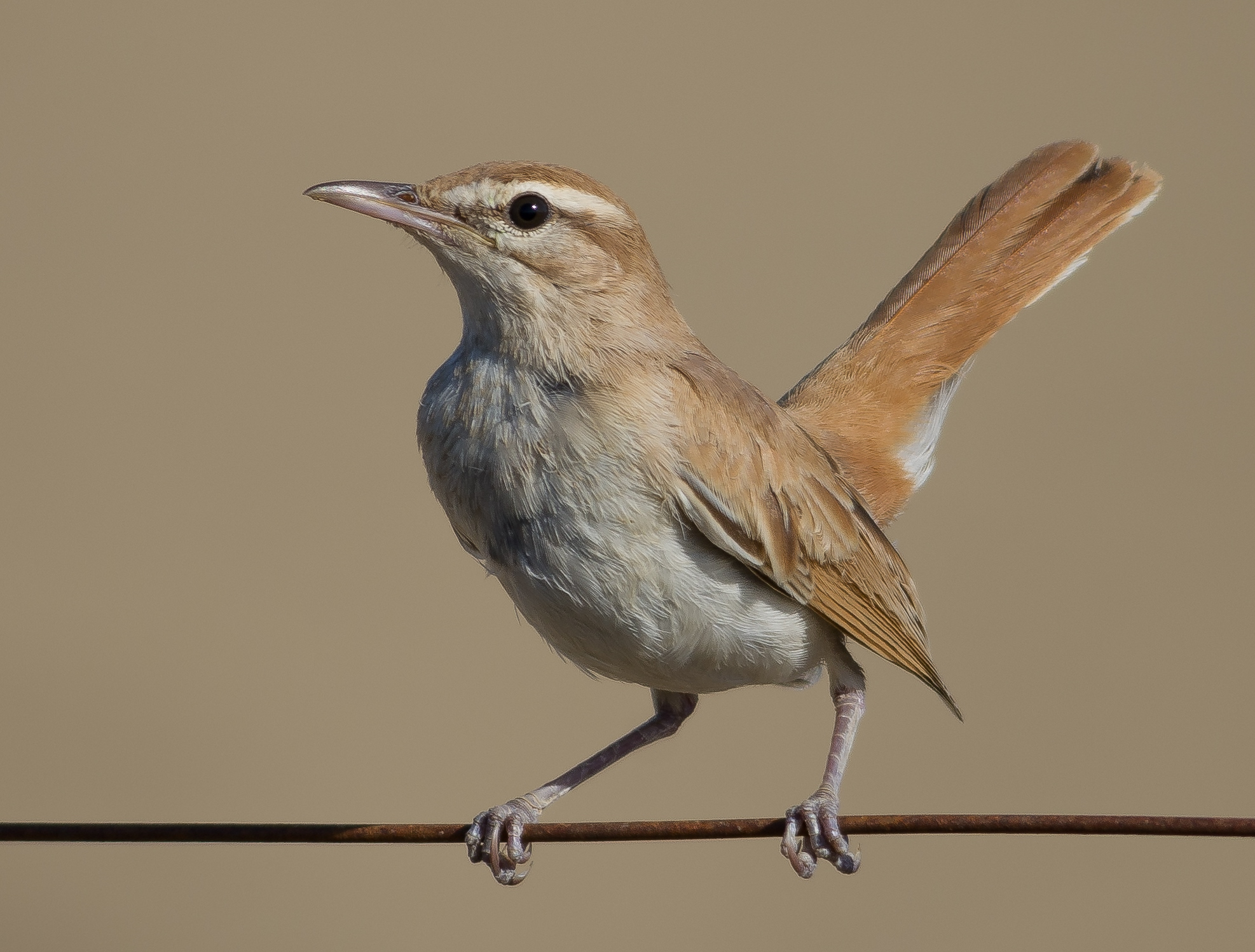 Agrobate roux (Cercotrichas galactotes) Rufous-tailed Scrub Robin (Parc National de l'Ichkeul (Tunisia)).